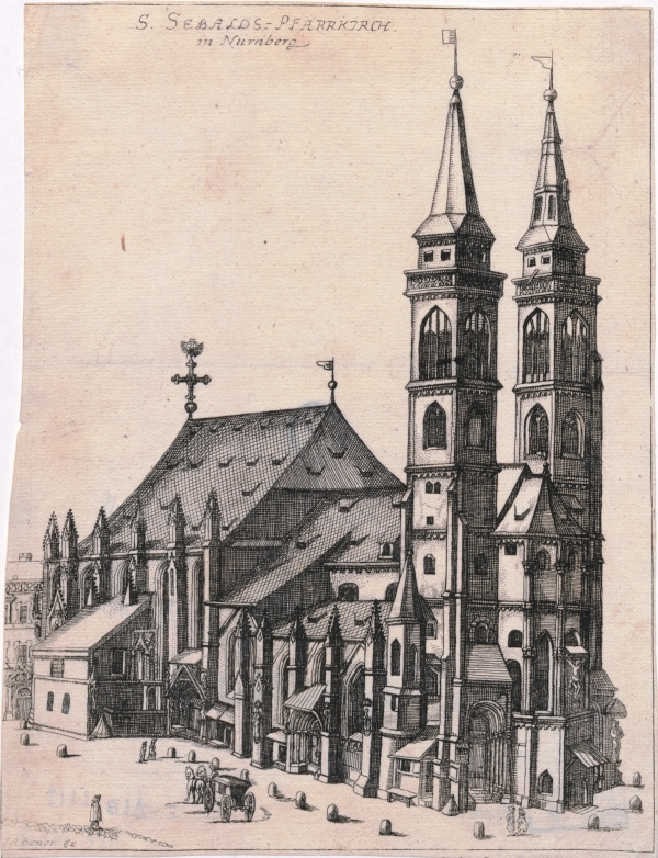 St. Sebald-Kirche in Nürnberg um 1700